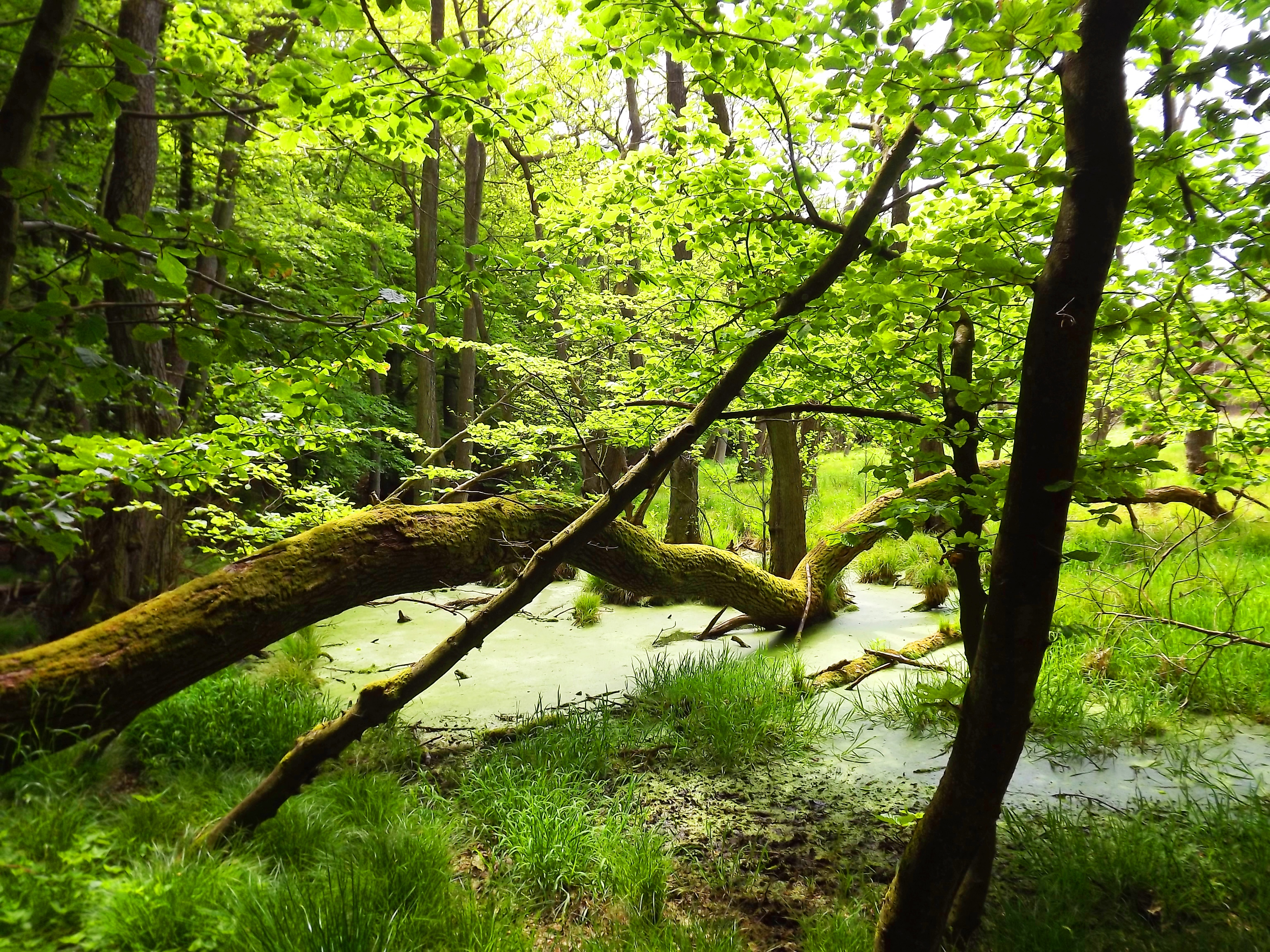 Moorlandschaft im Nationalpark Jasmund -Rügen